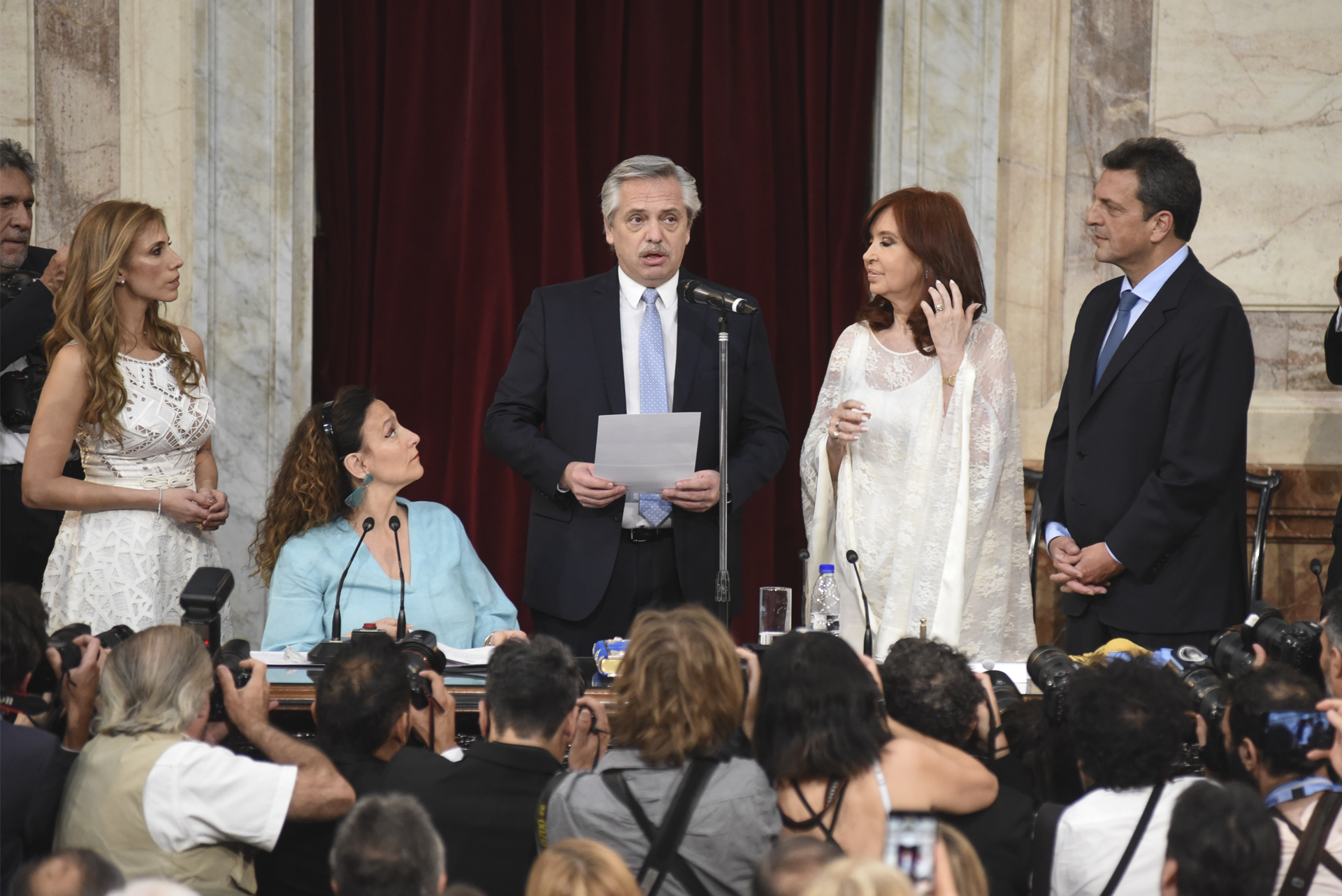 Este mediodía Alberto Fernández asumió como presidente de la Nación ante la Asamblea Legislativa y brindó un discurso donde delineó los principales objetivos de su gestión y “convocó a la unidad de toda la Argentina”.